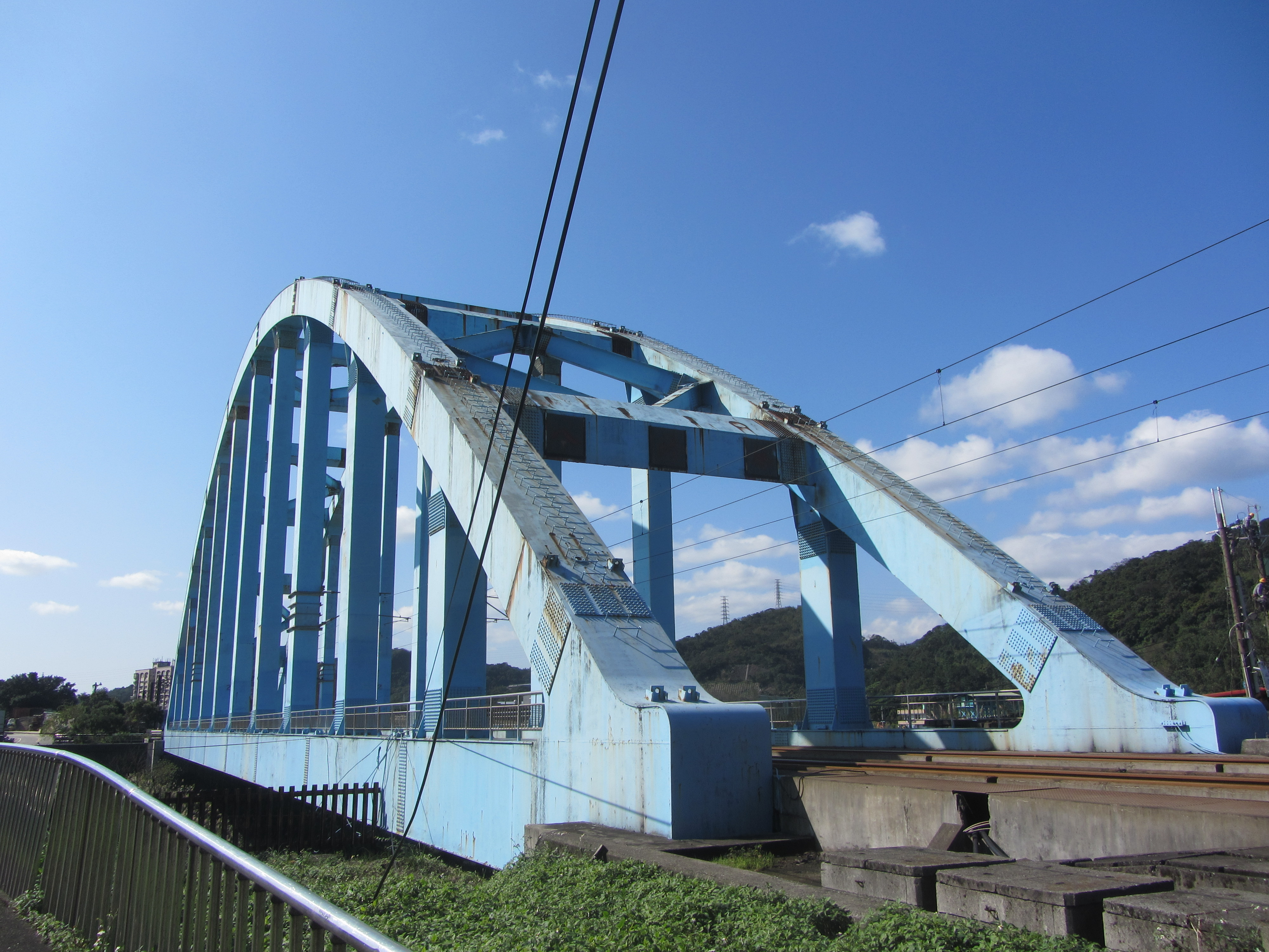 臺灣鐵路管理局八堵車站北端，跨越基隆河的新八堵鐵橋。